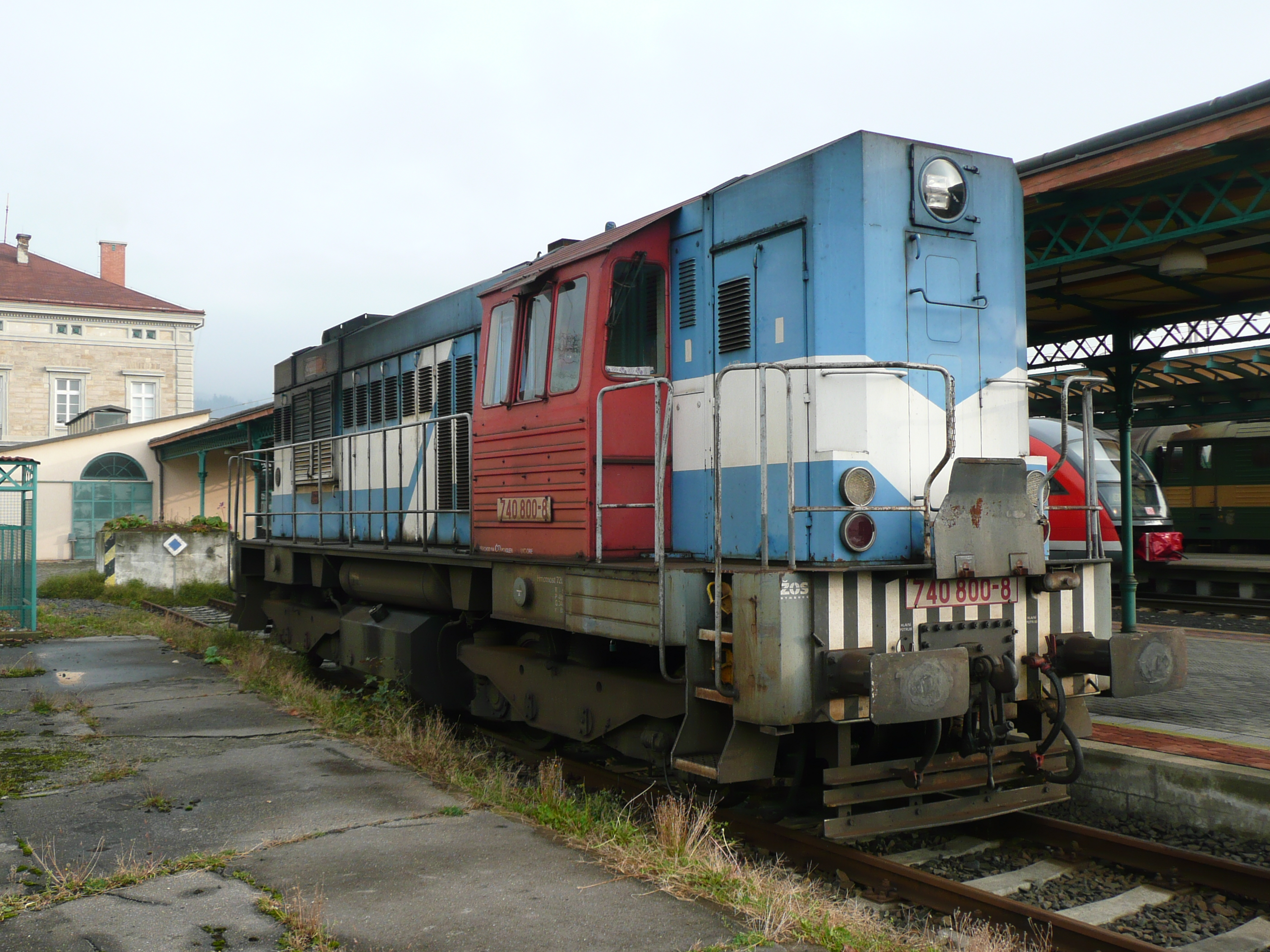 740 800 2012 in Decin h.l.n.